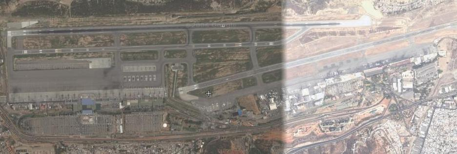 Foto del Aeropuerto Internacional de Maiquetia, tomada por Oliver Diaz. Es libre para uso de todos.